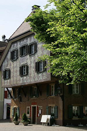 Chin. Restaurant "Zum Turm" in Olten